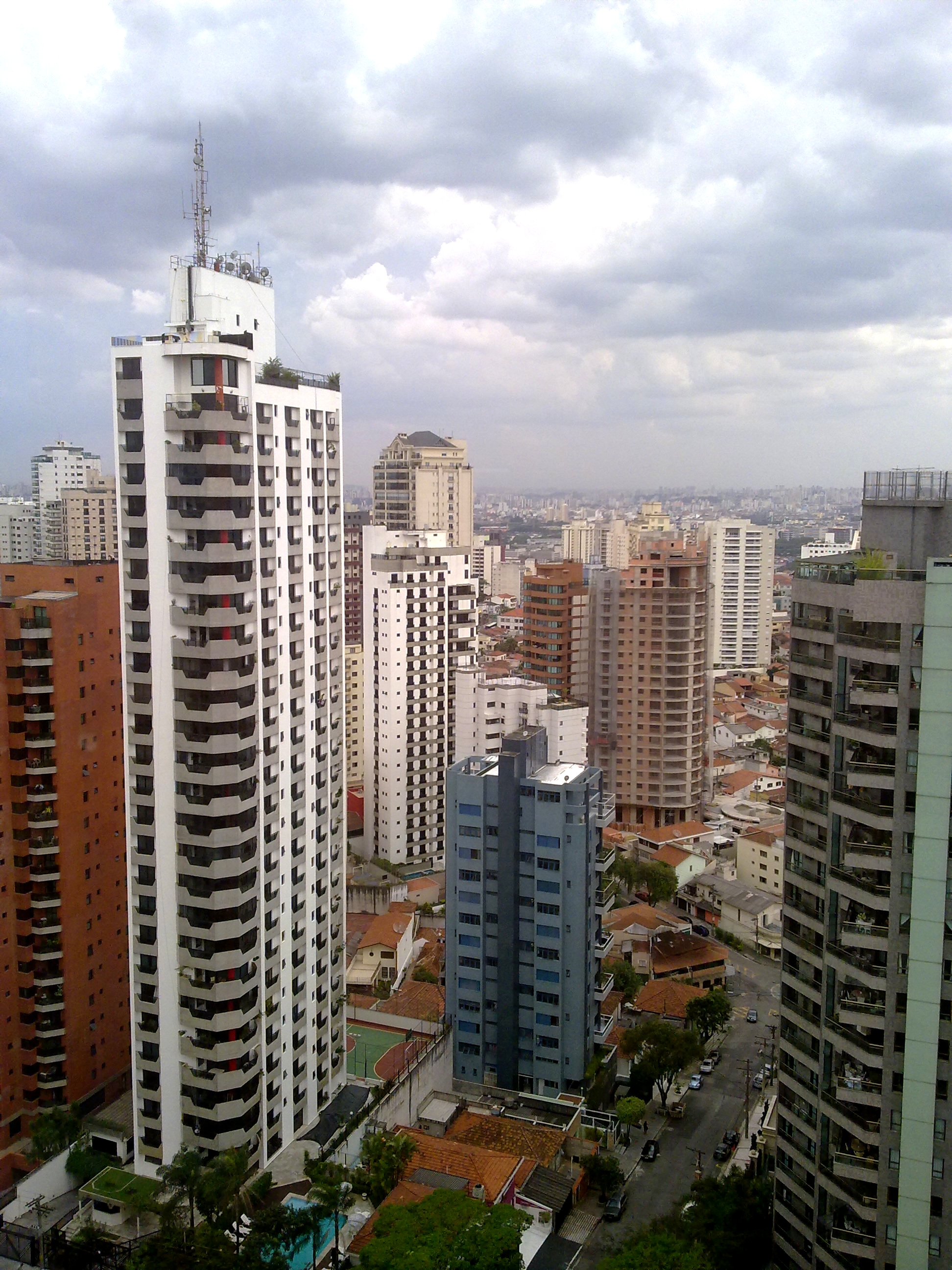 Foto dos edifícios da região do Alto de Santana, zona norte de São Paulo/SP Brasil